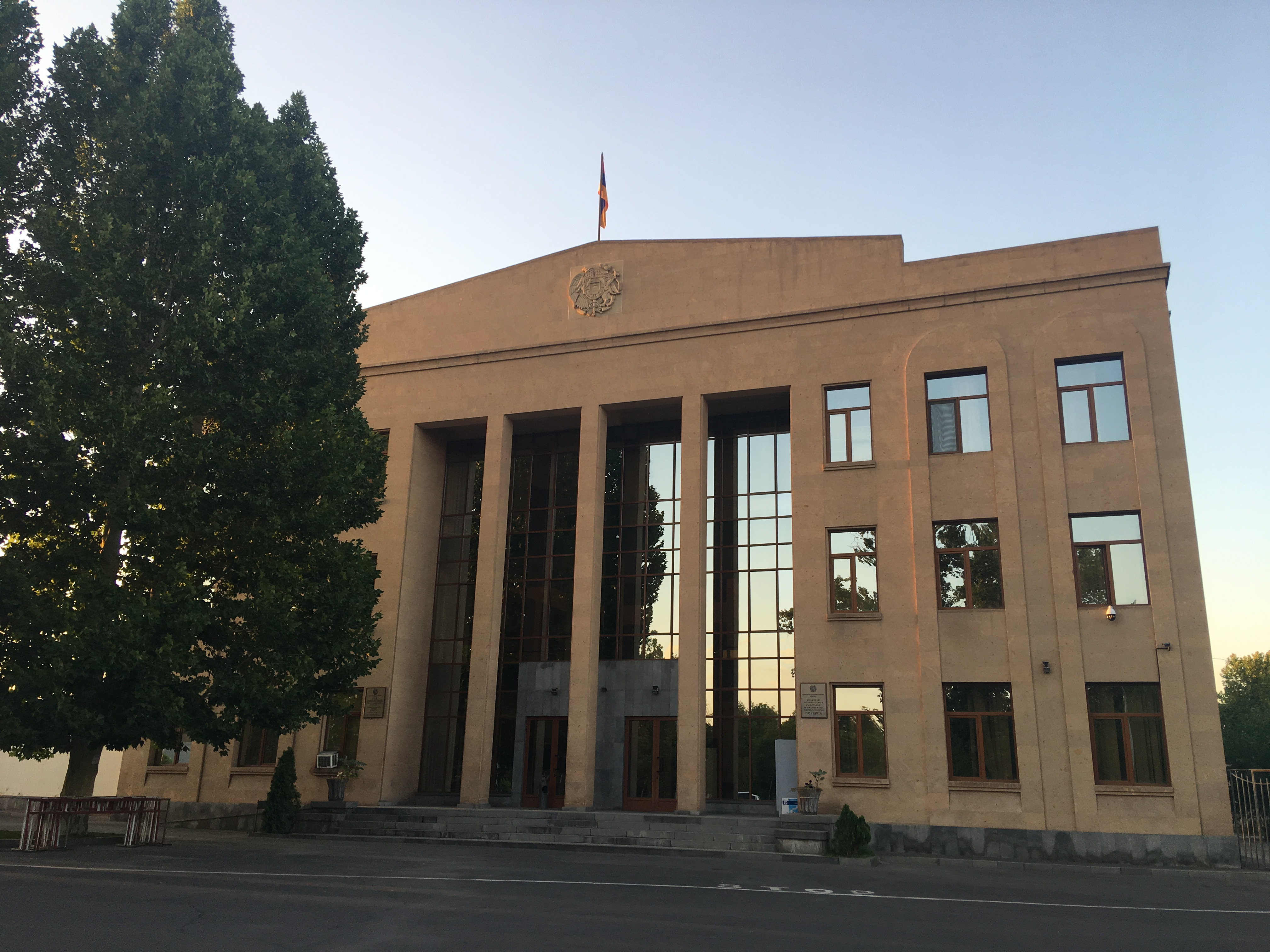 Շենգավիթ վարչական շրջանի ընդհանուր իրավասության դատարան